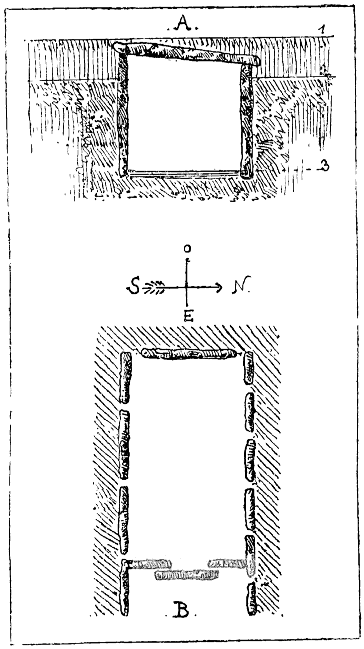 Dolmen de Caranda. A, Élévation face Est. — B, Plan — 1, terre végétale — 2, sable jaune. — 3, dallage grossier.